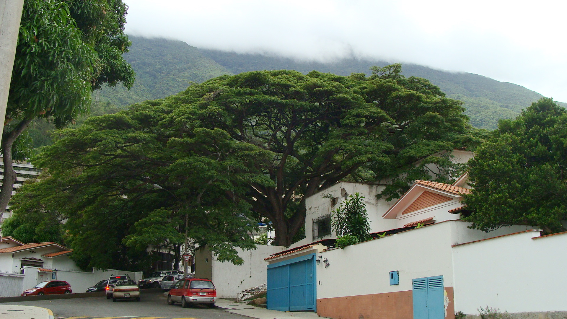 Ejemplar de samán (Samanea saman Synonym: Pithecellobium saman) en una quinta al pie del Ávila, en Caracas